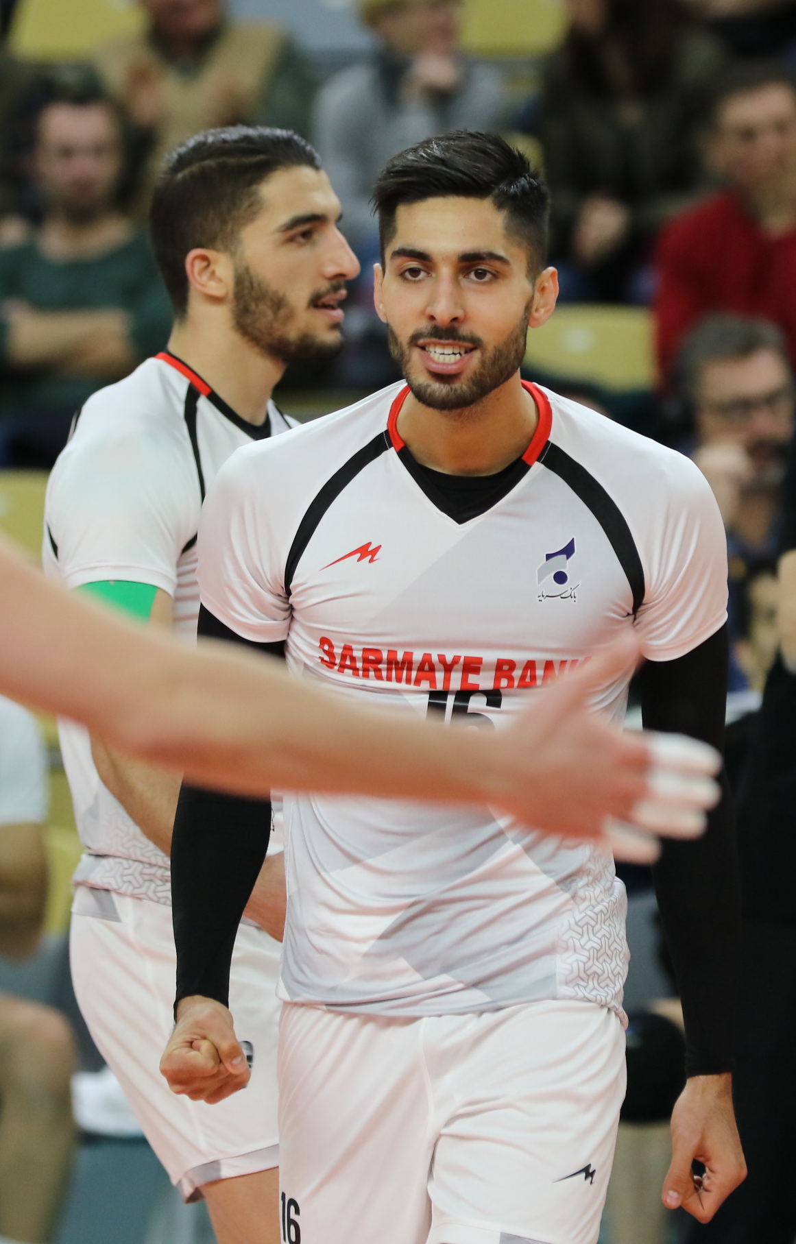 علی شفیعی در جام باشگاه های جهان ، 2017